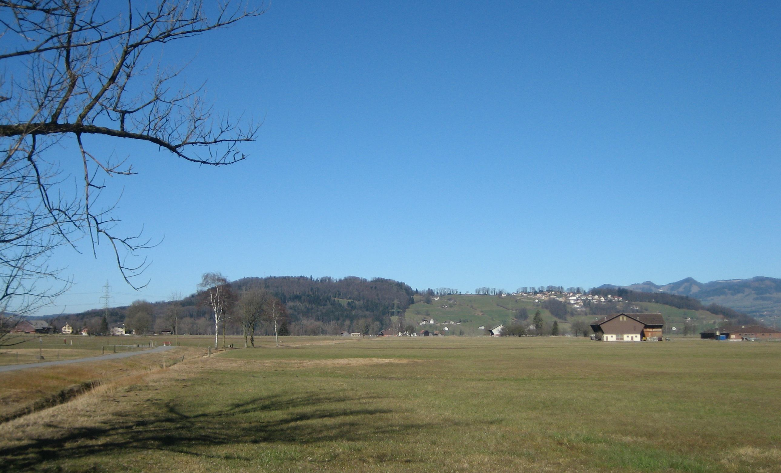 Benkener Büchel